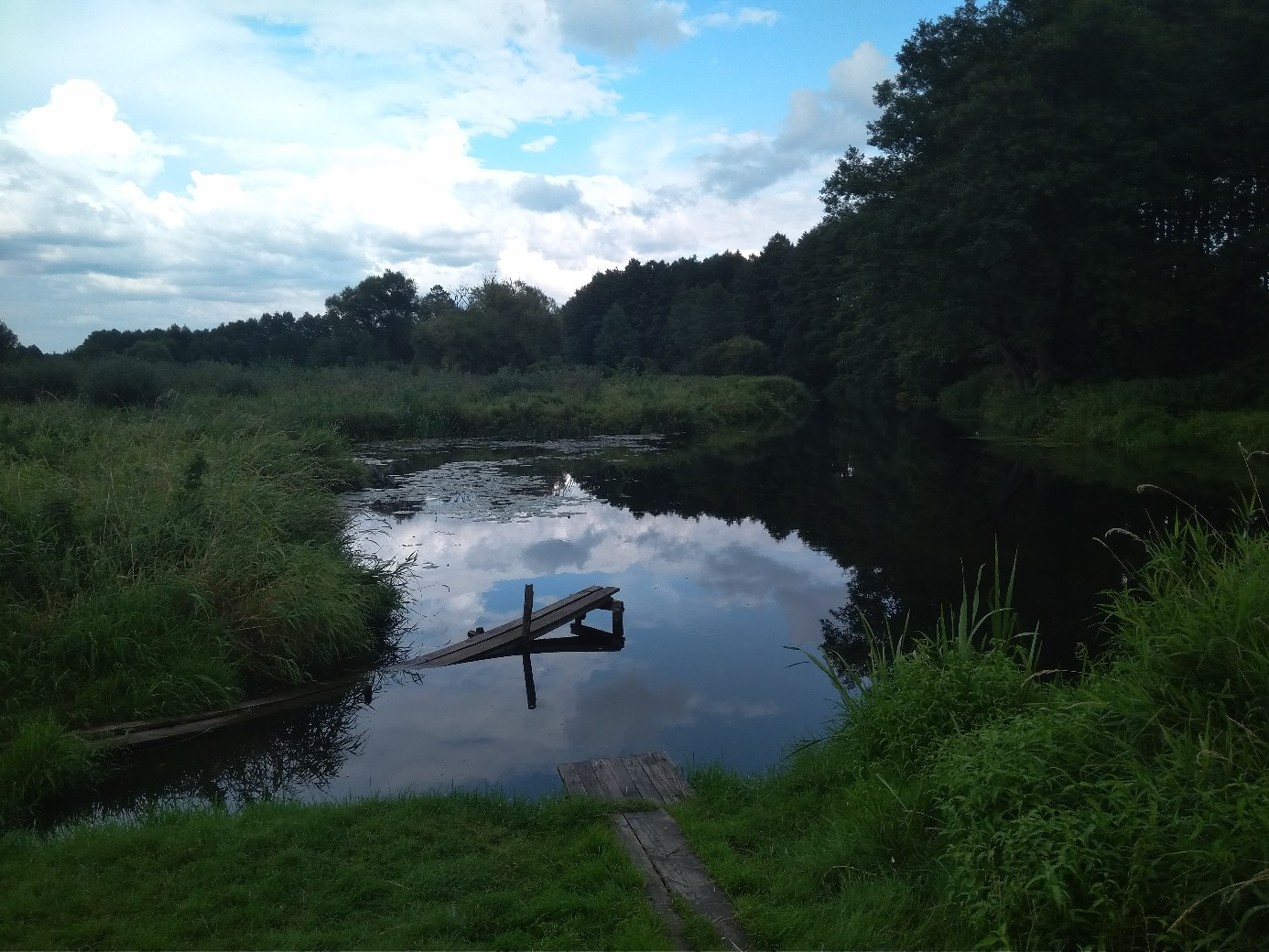 Слияние рек Студянка и Уса на окраине деревни Плоское Дзержинского района